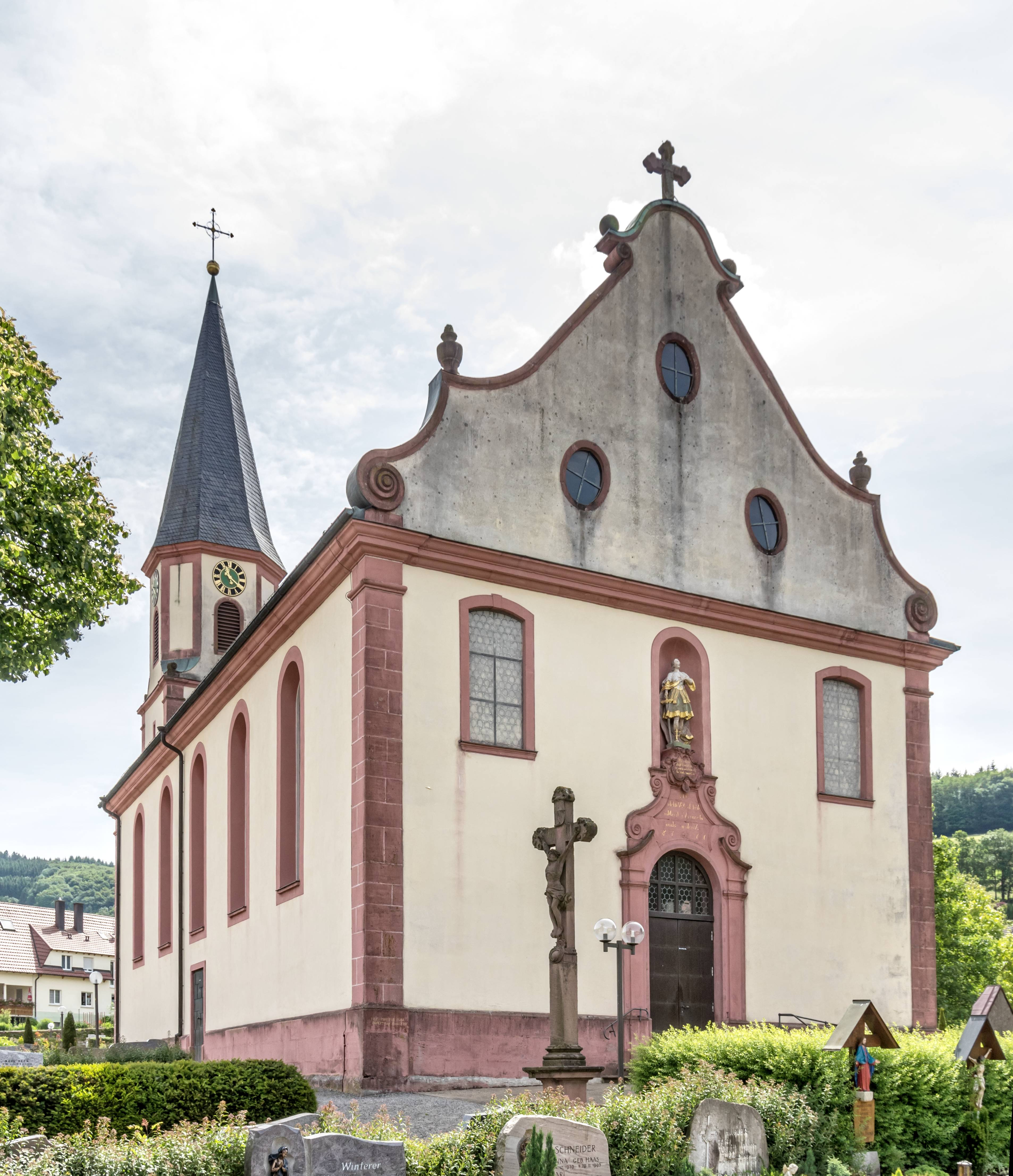 Bilder von der Kirche St. Romanus in Schweighausen Die Kirche von Nordwesten